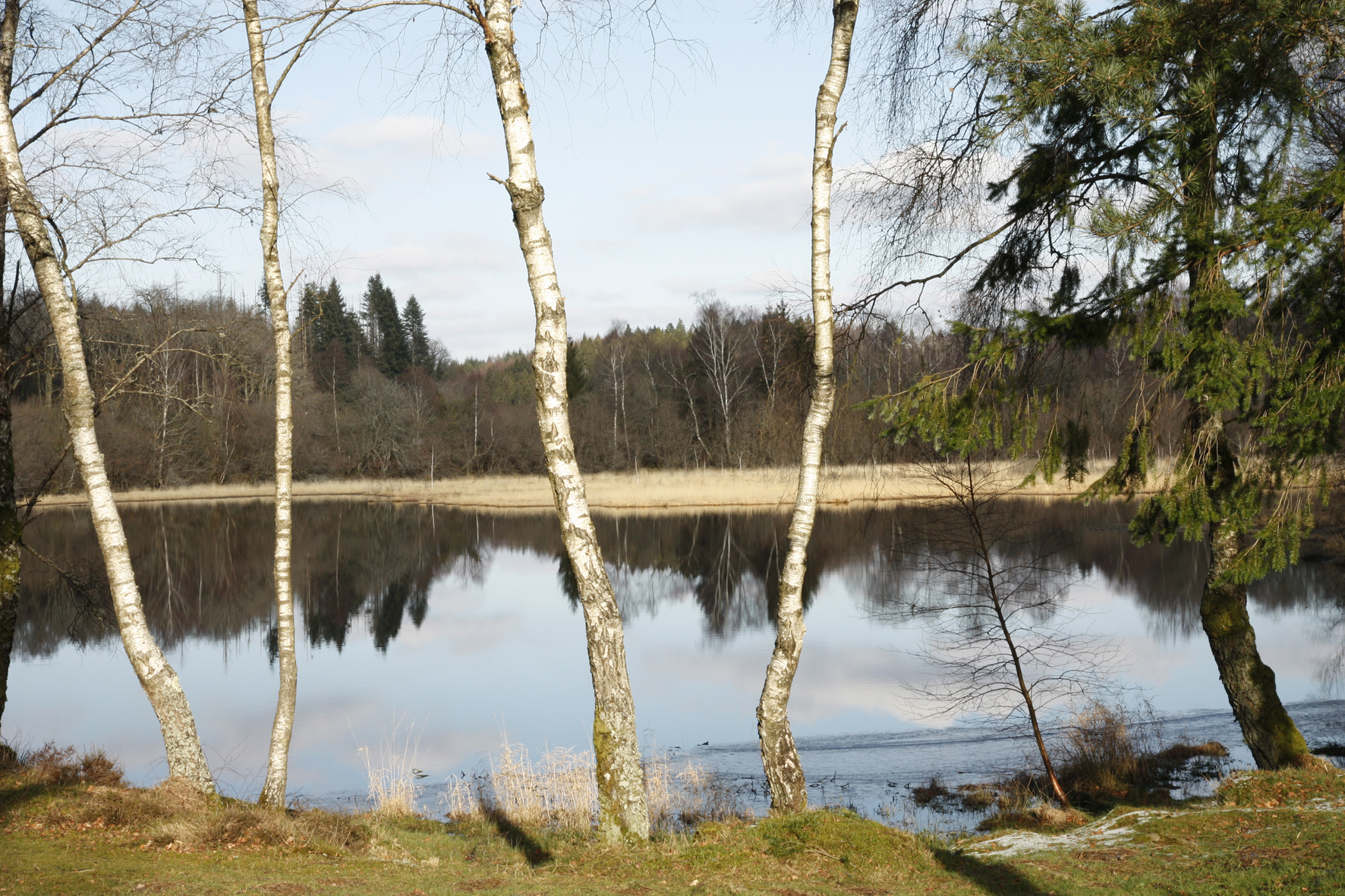 étang de Bourdeau, commune de saint-pardoux-morterolles